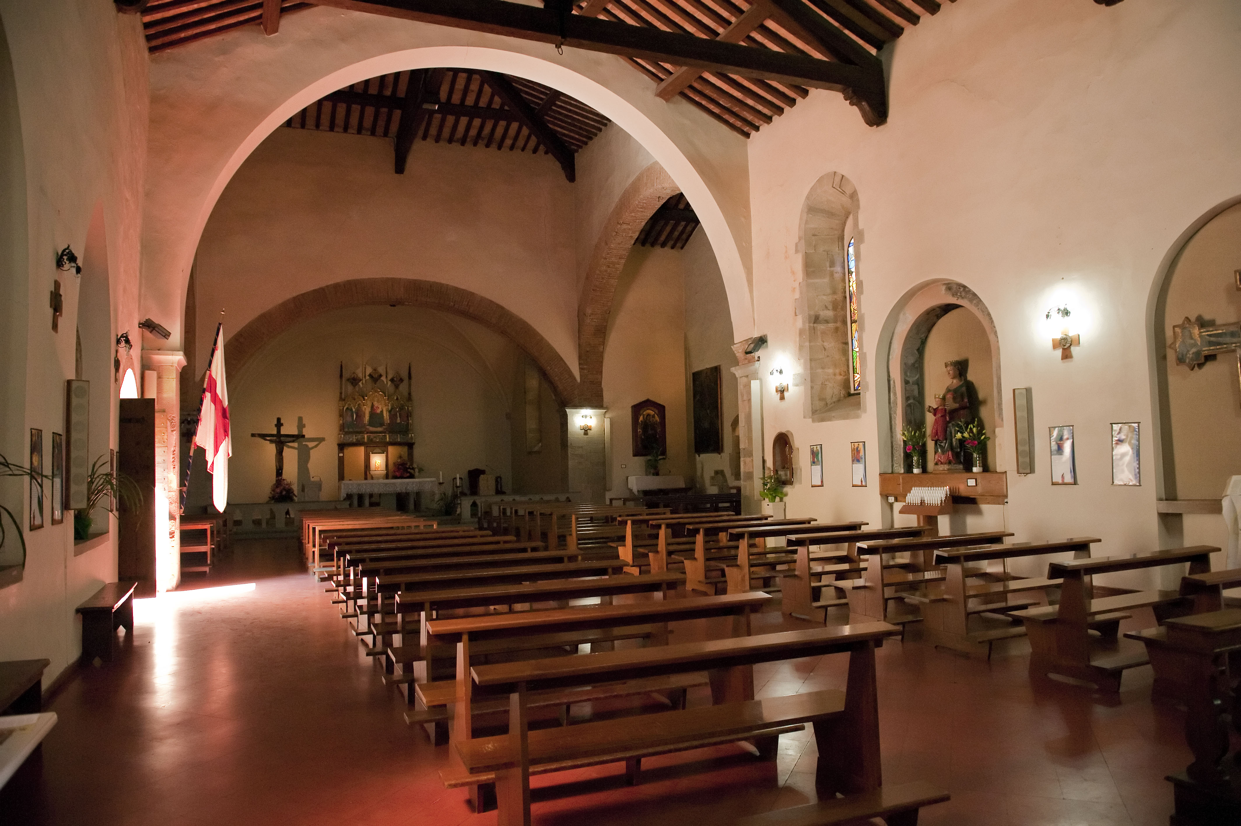 Interno della propositura dei santi ippolito e donato a Bibbiena (Arezzo